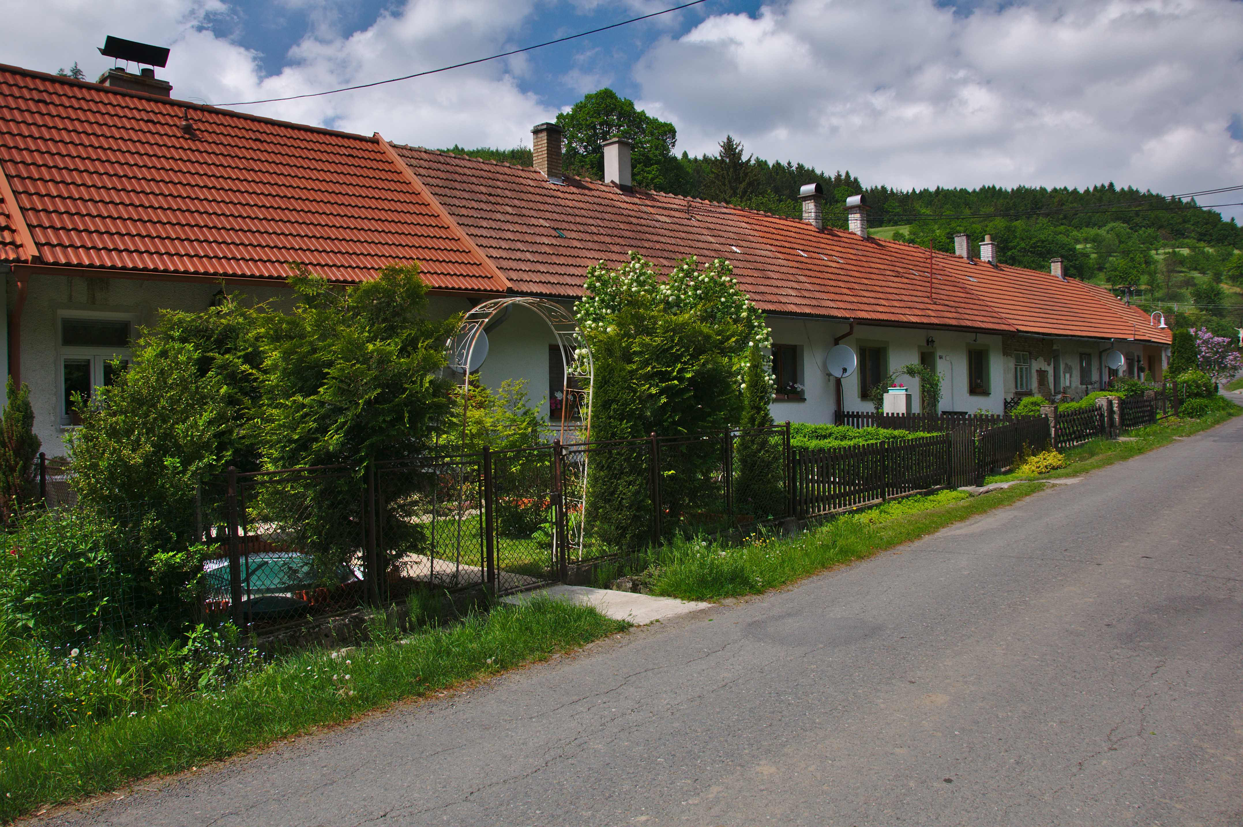 Dělnická kolonie, Sidonie, Brumov-Bylnice okres Zlín